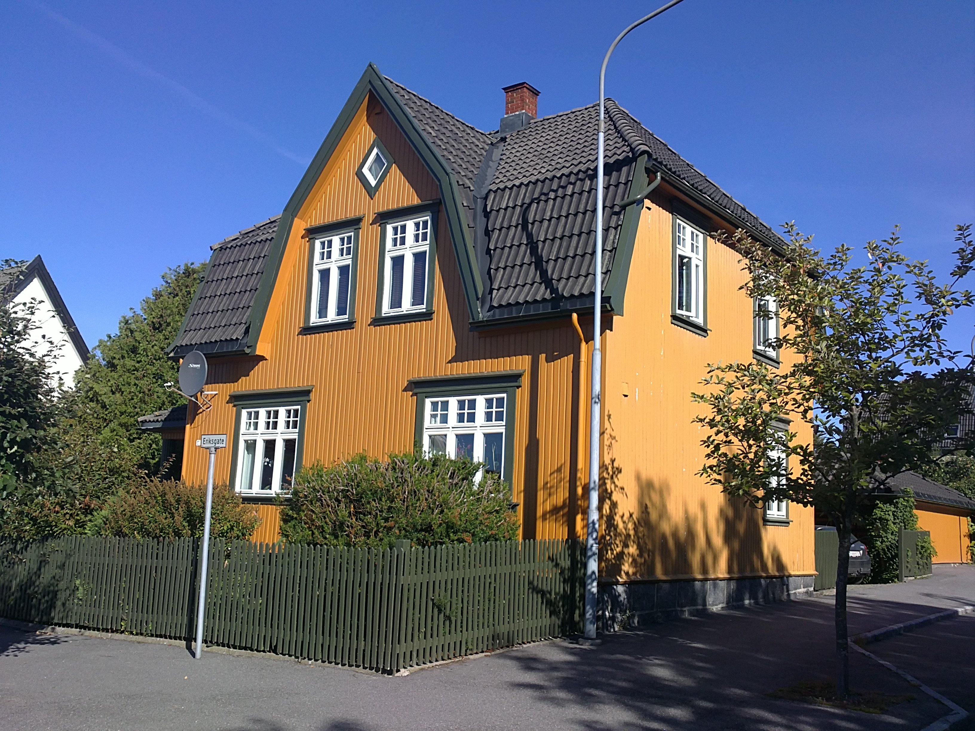 Bilde av Eriks gat 27, Larvik